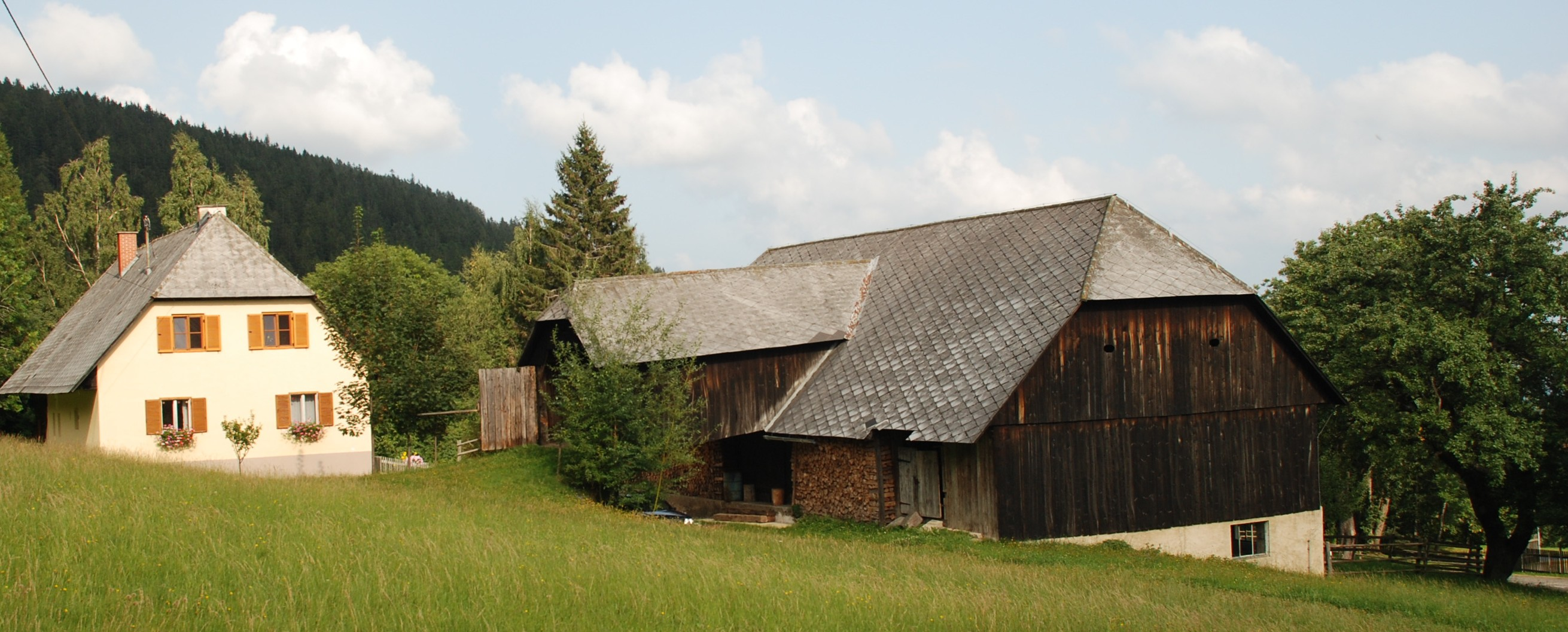 Bauernhof vlg. Gratzen von Westen